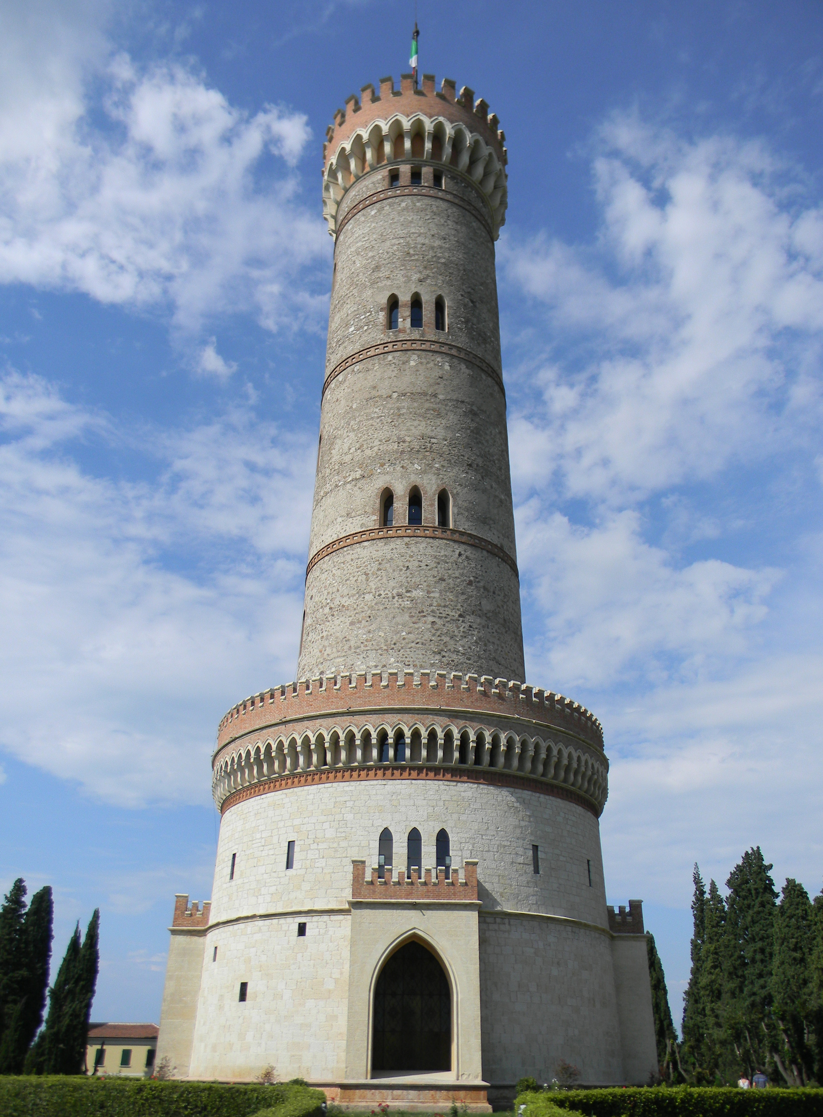 Tour de San Martino, Italie.